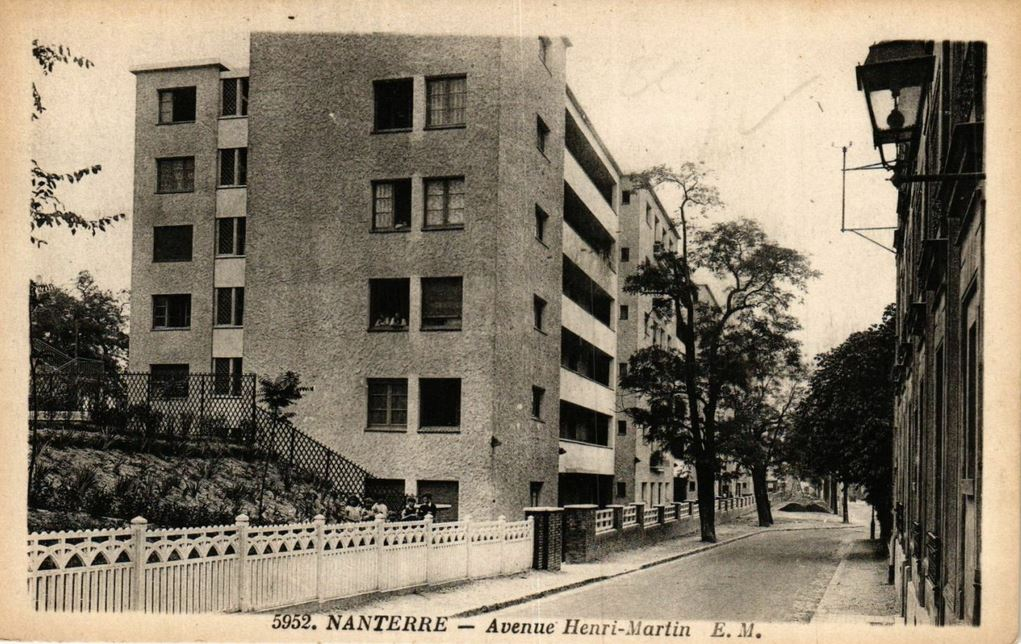 Nanterre.Avenue Henri-Martin.Immeubles